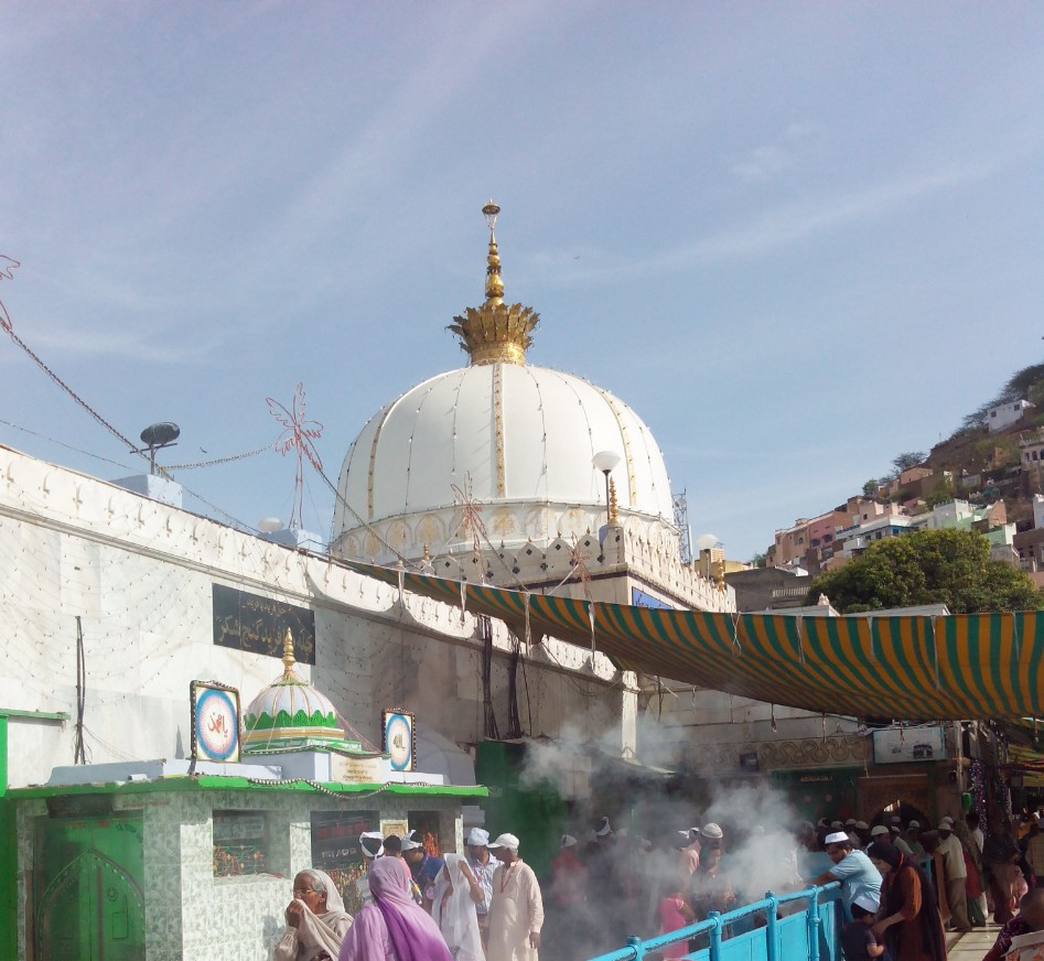 Dargah Sharif Ajmer